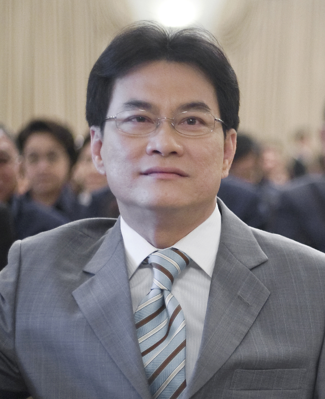 นายกรัฐมนตรี เป็นประธานเปิดโครงการและมอบนโยบายให้ทุกภาคส่วนเข้ามามีส่วนร่วมจัดการส่ง เสริมการอ่านเพื่อสร้างสังคมแห่งการเรียนรู้ตลอดชีวิต ณ ตึกสันติไมตรี ทำเนียบรัฐบาล 6กันยายน2552 (The Official Site of The Prime Minister of Thailand Photo by พีรพัฒน์ วิมลรังครัตน์)